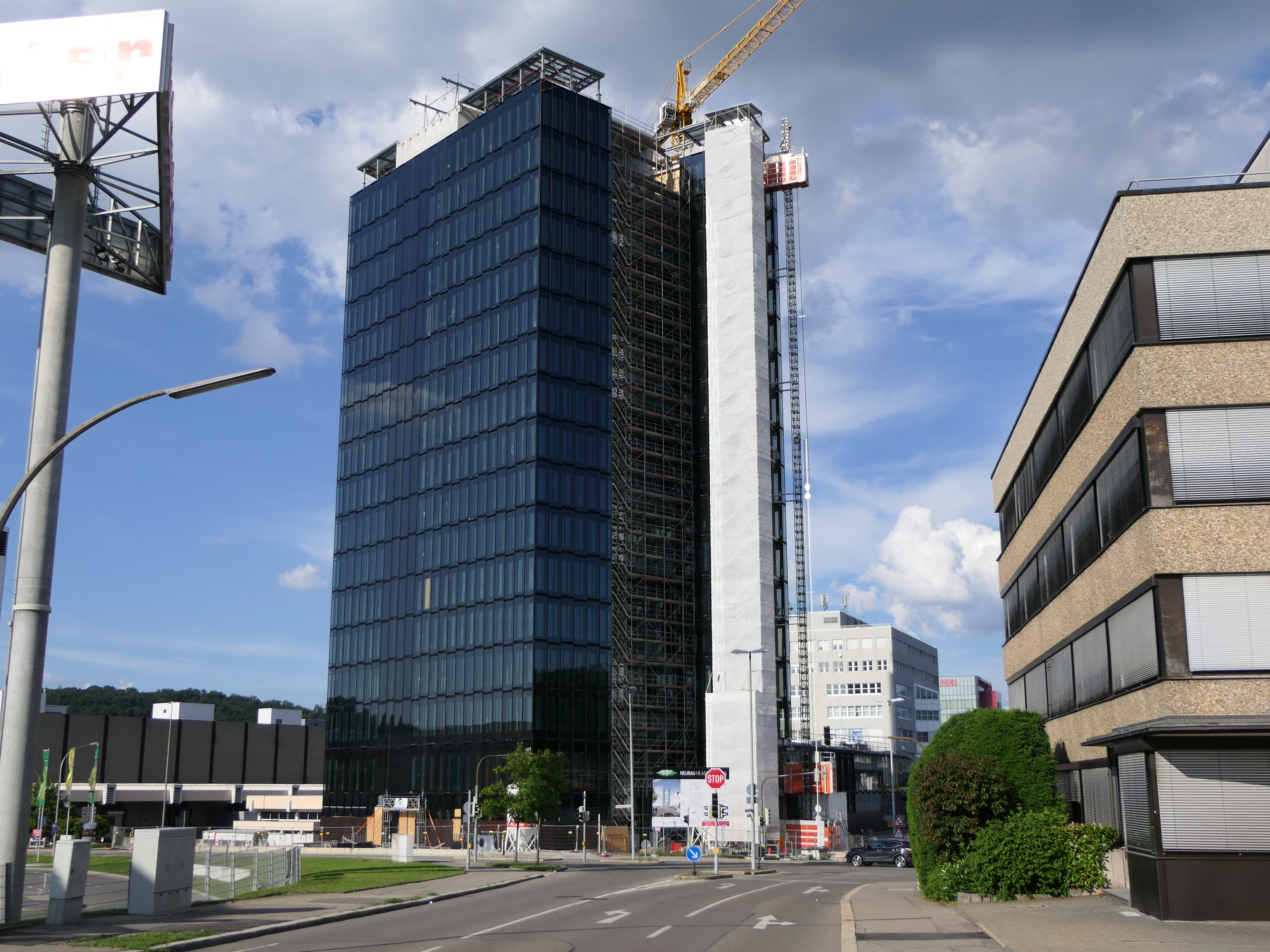 Das Hochhaus der Firma Bitzer in Sindelfingen im Juni 2018.